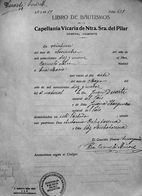 Acta de bautismo de Eva María Duarte. 21/11/1919. Capellanía N. S. Pilar. General Viamonte. P: Buenos Aires. Argentina.